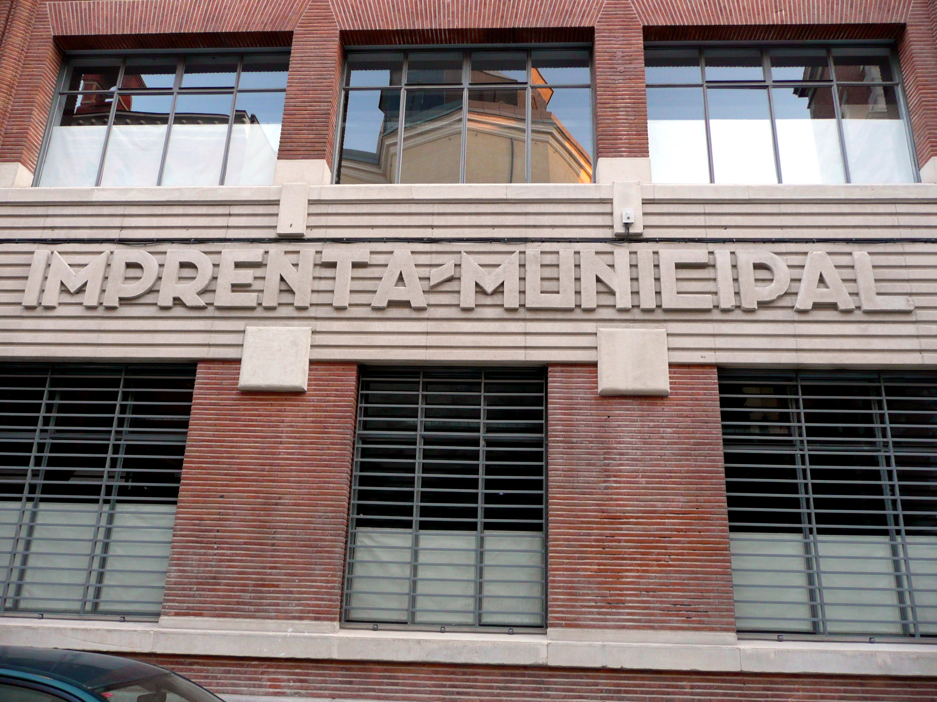 Madrid